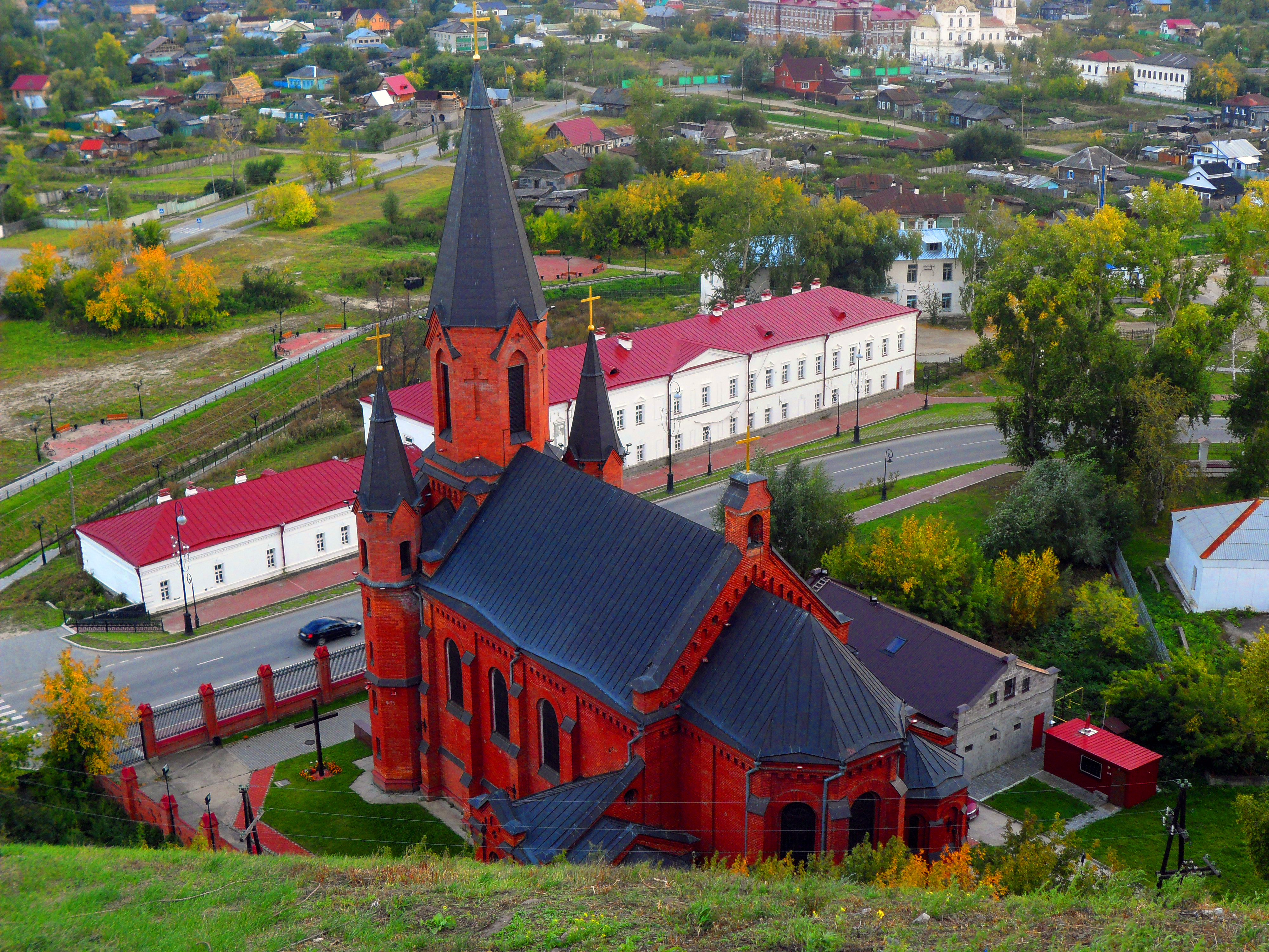 Польский костел: улица Розы Люксембург, 11, Тобольск, Тюменская область